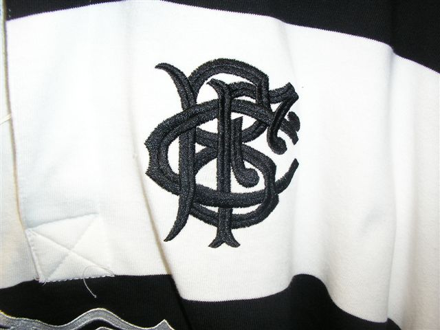 Maillot de rugby du Barbarian Football Club